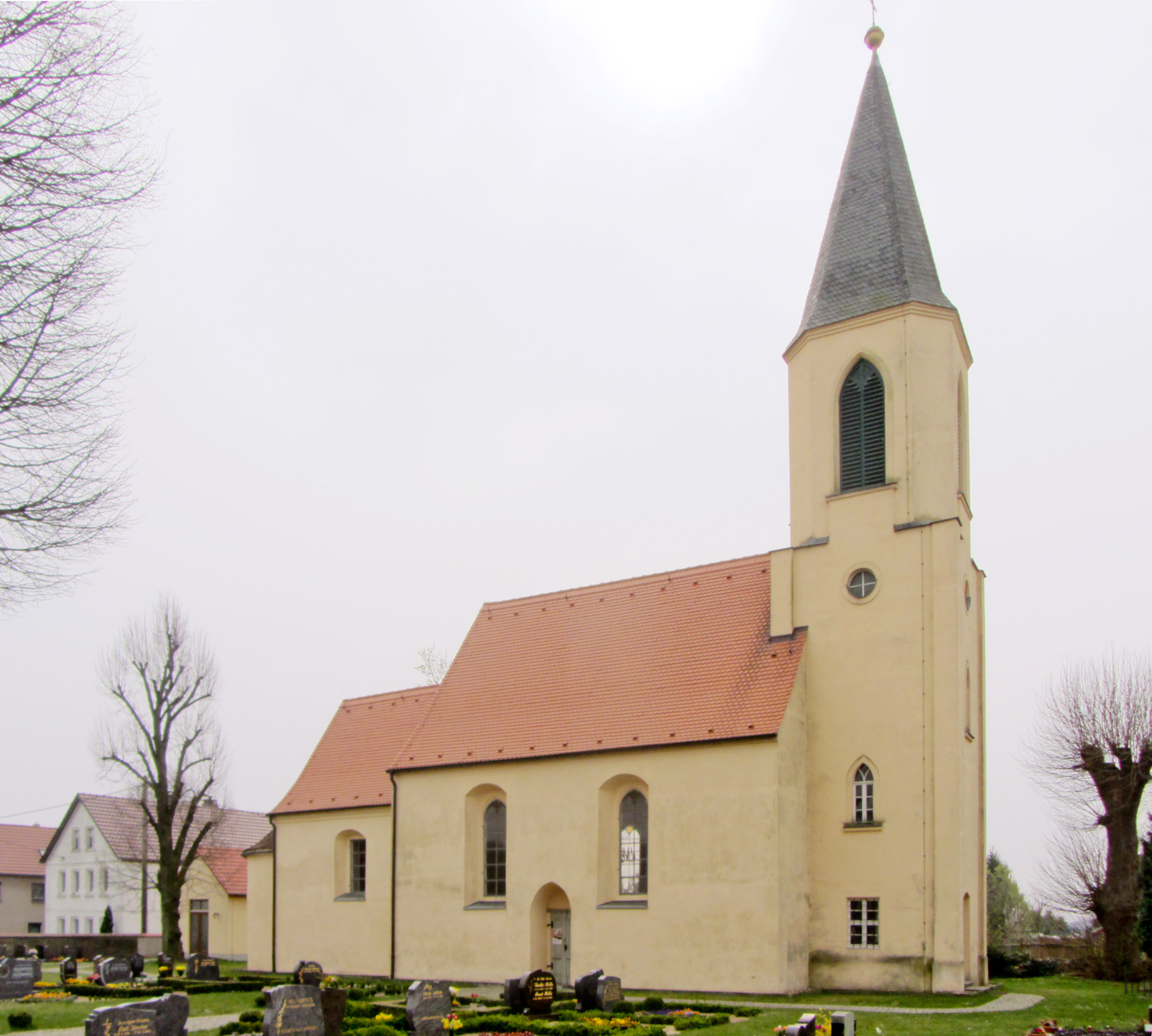 Kirche, Mitteldorfstraße 4 in Großenhain OT Strauch